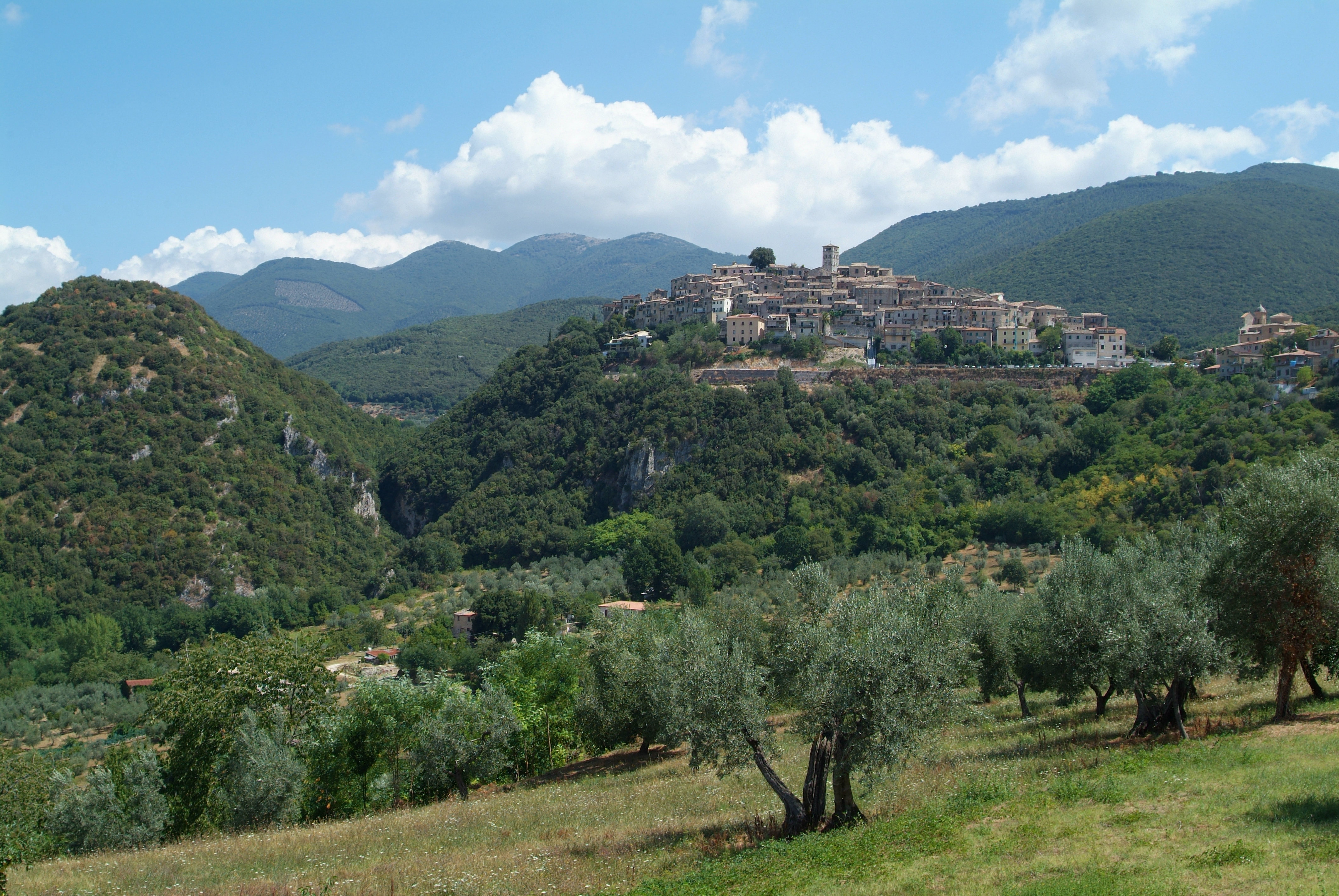 Panorma generale di Casperia